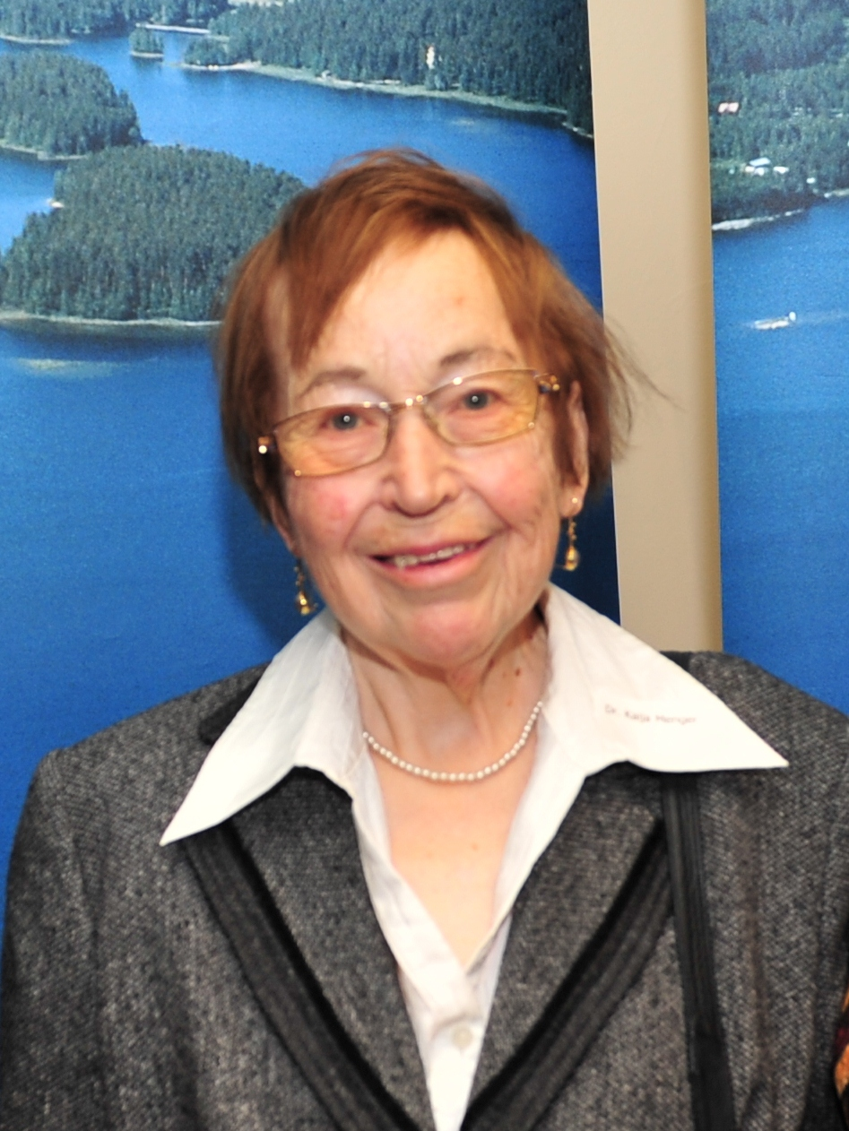 Bild: H. Hansen © 2012